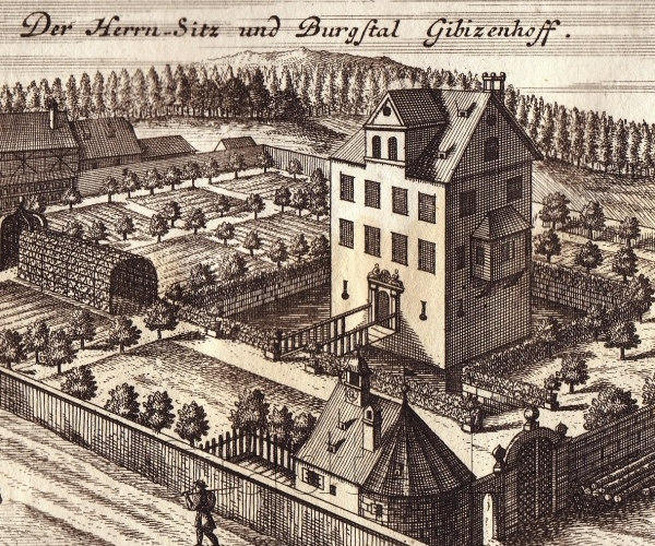 Gibitzenhof, Ansicht des Herrensitzes mit dem Herrenhaus im gefütterten Graben, Kupferstich von vor 1708 aus Nürnbergische Hesperides von J. C. Volkamer